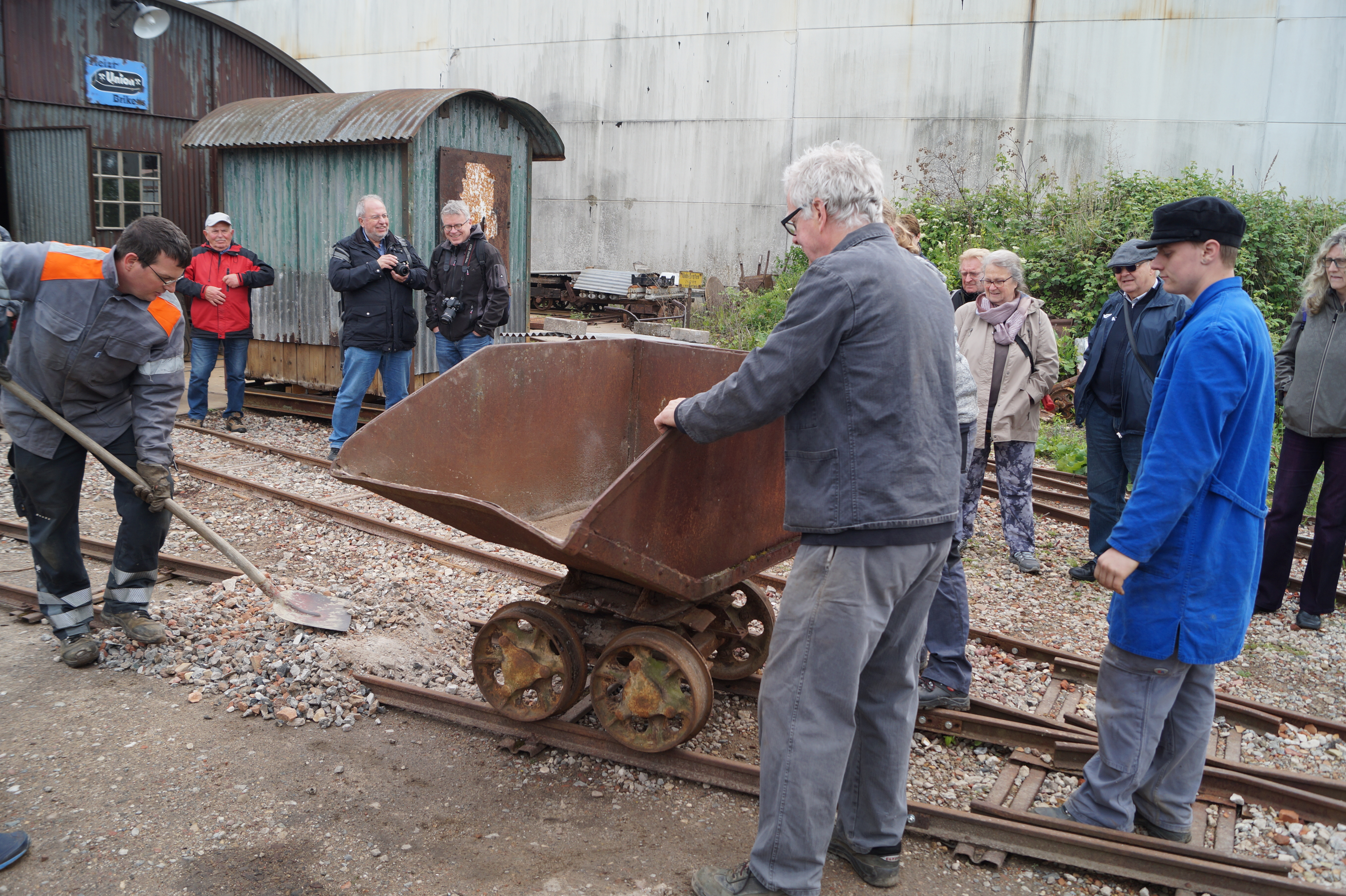 Frankfurter Feldbahnmuseum (4. Mai 2019)